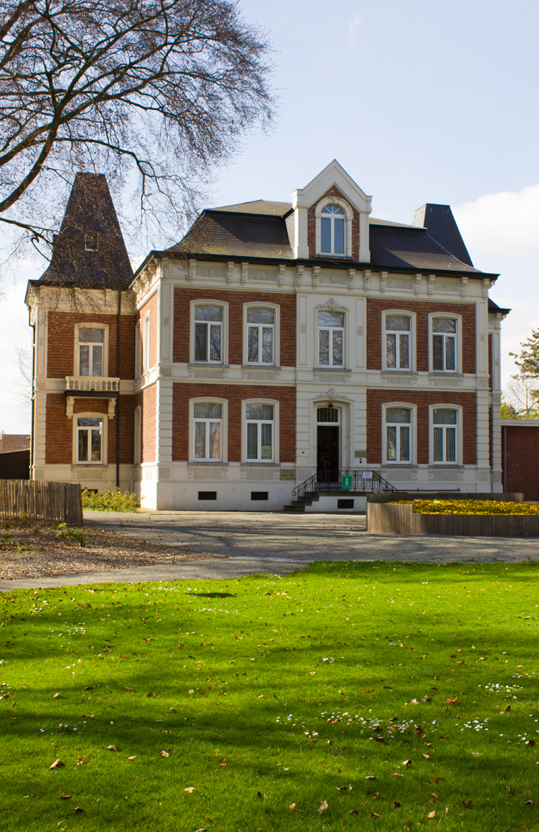 Simonshuis te Achel. Het bijhorende park werd in 2010-2011 opnieuw ingericht en hersteld.